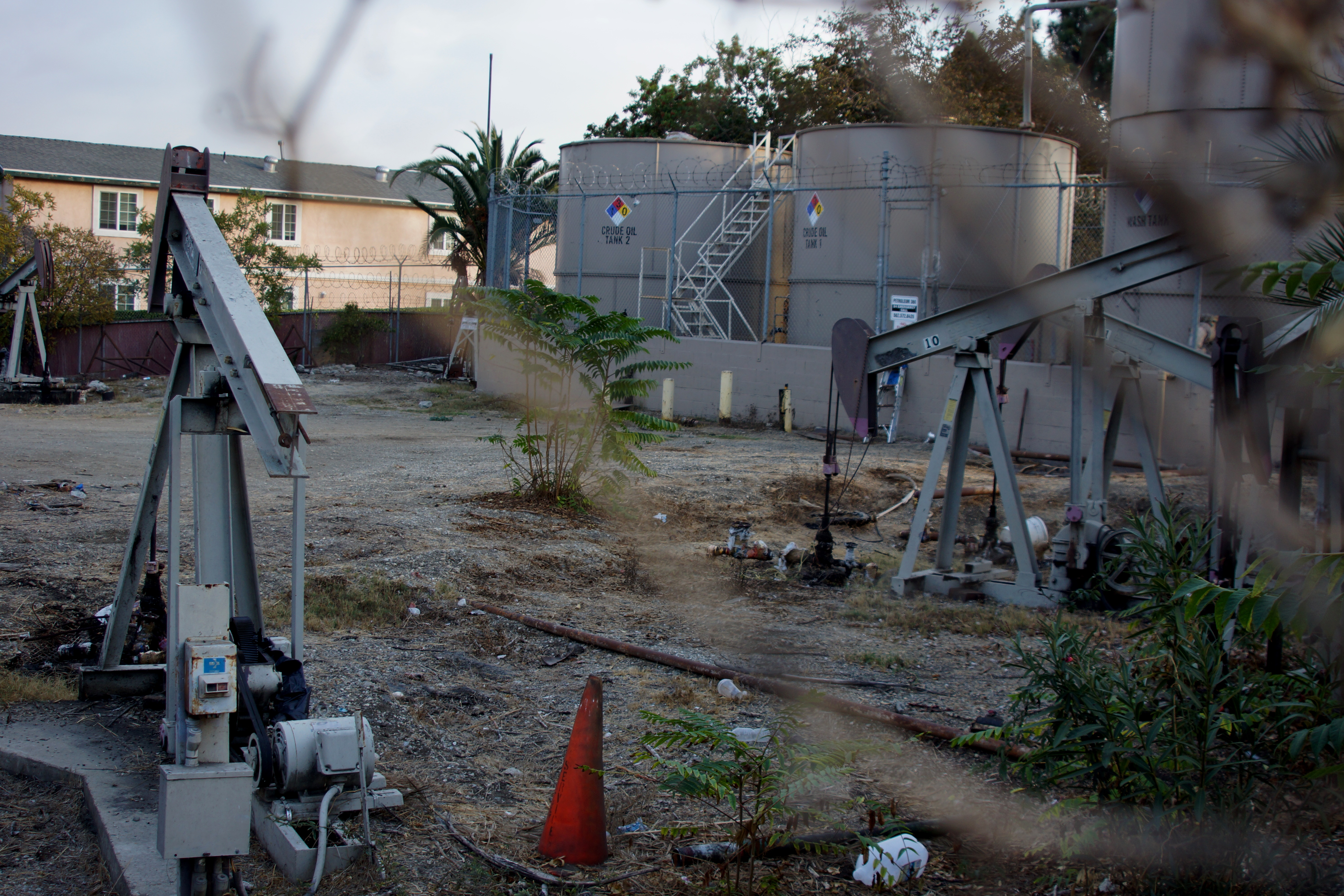 2013, Oil Jack Pumps